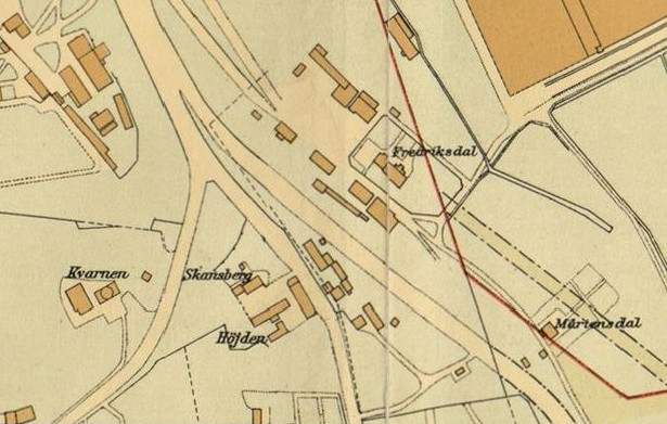 Del av 1930 års karta över Stockholm visande Skansbacken, Fredriksdal och Mårtensadal